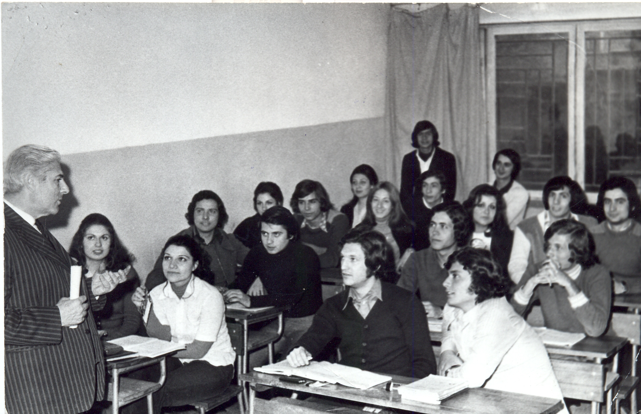 Tamer Levent Bey'in arşivinden gönderilen resim